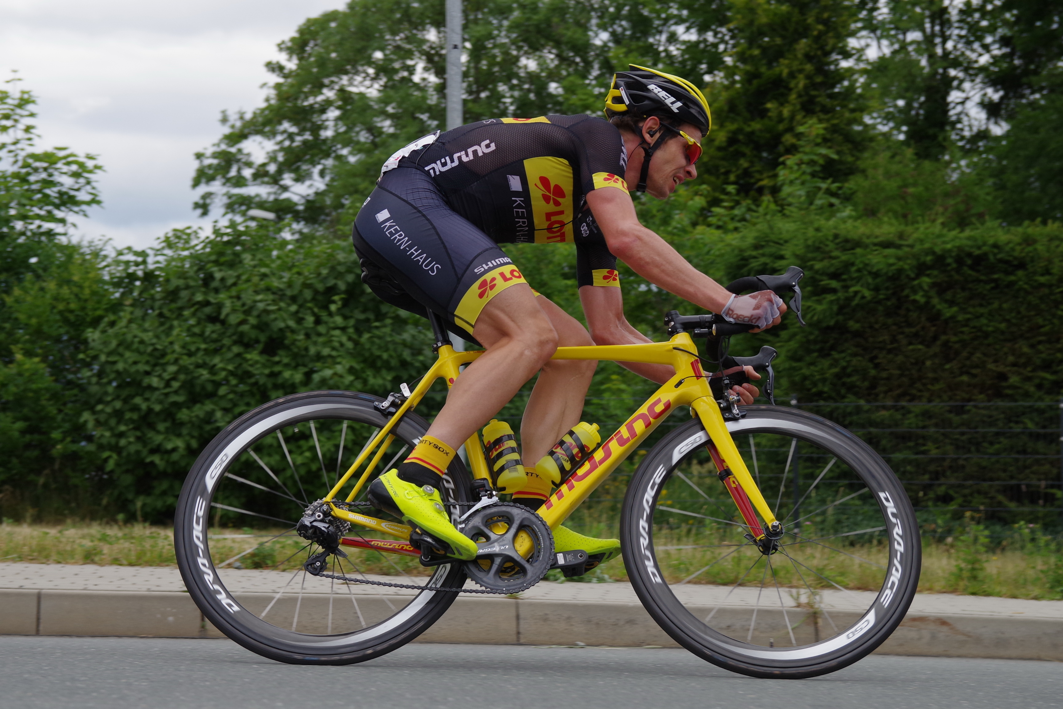 Deutsche Meisterschaften im Straßenrennen 2017 (Männer) 25. Juni 2017 Runde 9 Adelsberg The making of this document was supported by the Community-Budget of Wikimedia Germany.